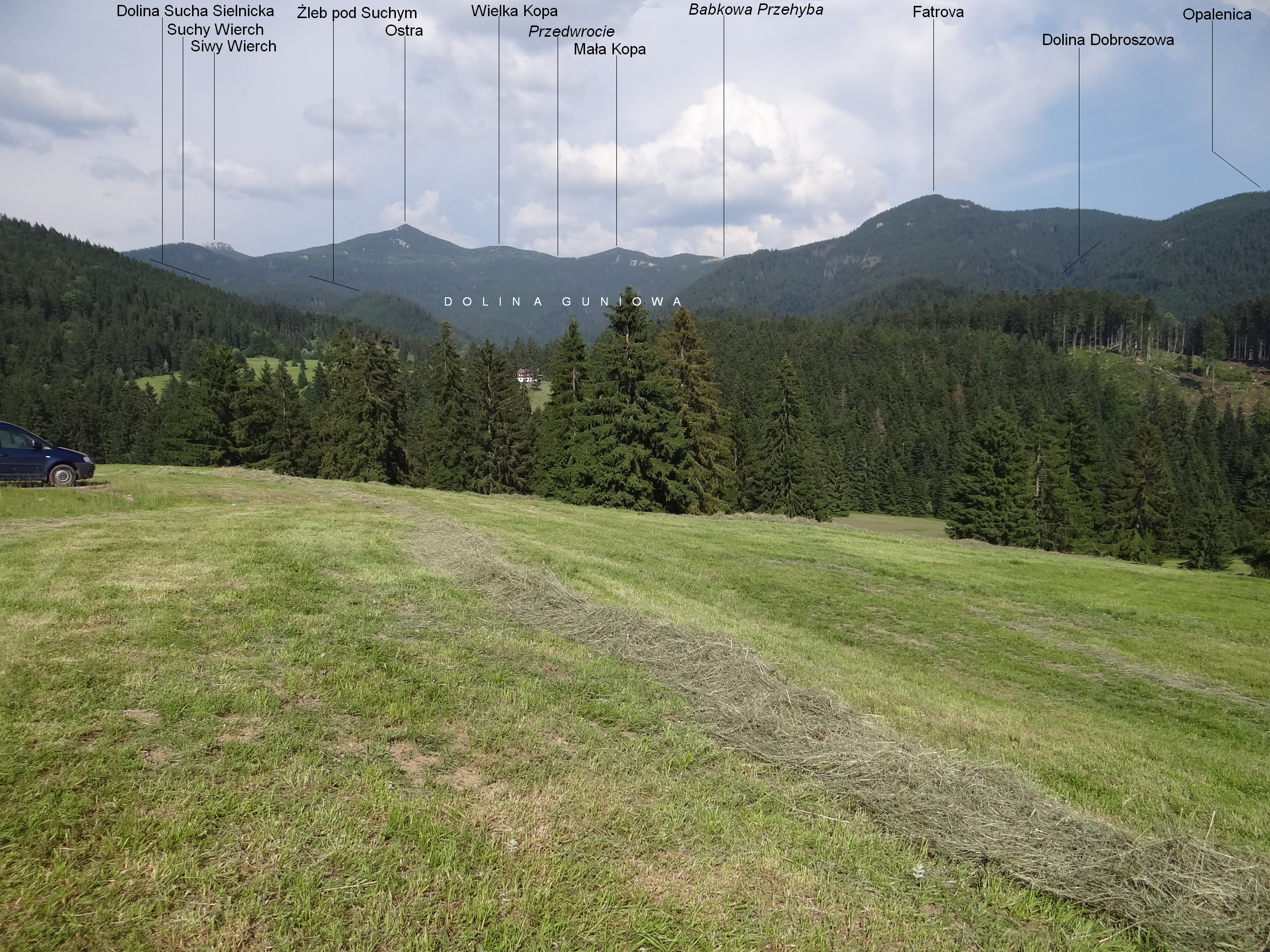 Widok z szosy pomiędzy Liptowskimi Matiaszowcami a Wyżnią Przełęczą Huciańską